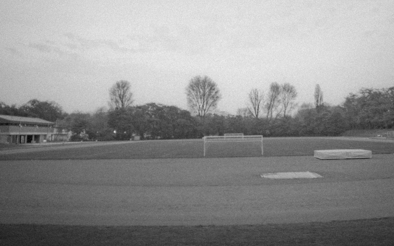 Jahnstadion (Neuss) - alte Aufnahme